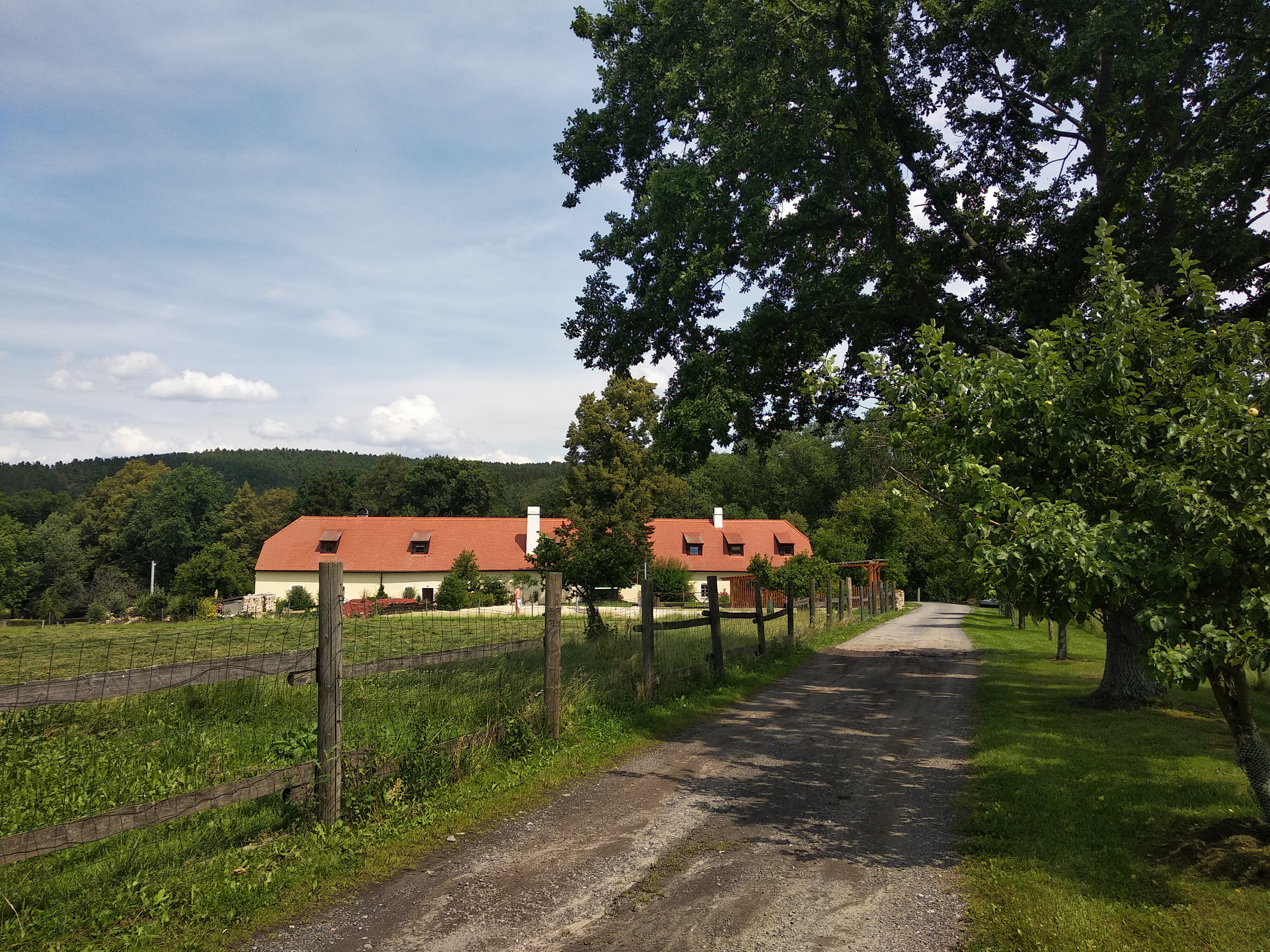 Pohled na osadu Jedraž v jižních Čechách, okres Strakonice